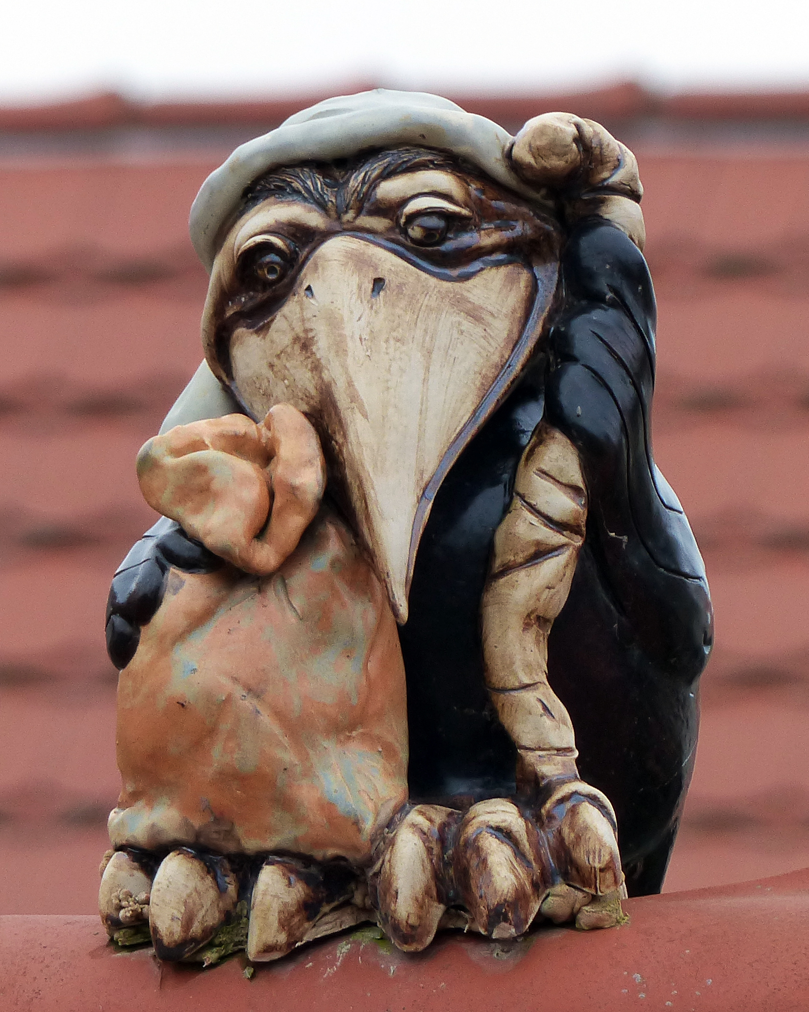 Krabat als Ton-Rabe auf einer Mauer in Schwarzkollm